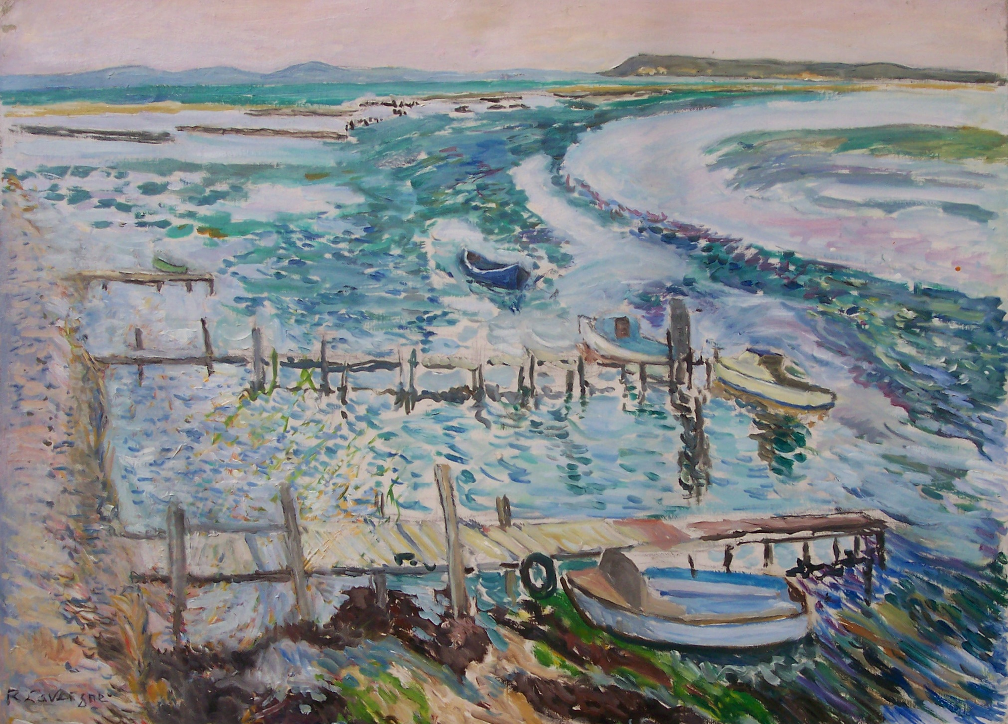 une autre vue de l'étang de la Berre près de Port La Nouvelle - Aude - France, une peinture de Robert Lavergne